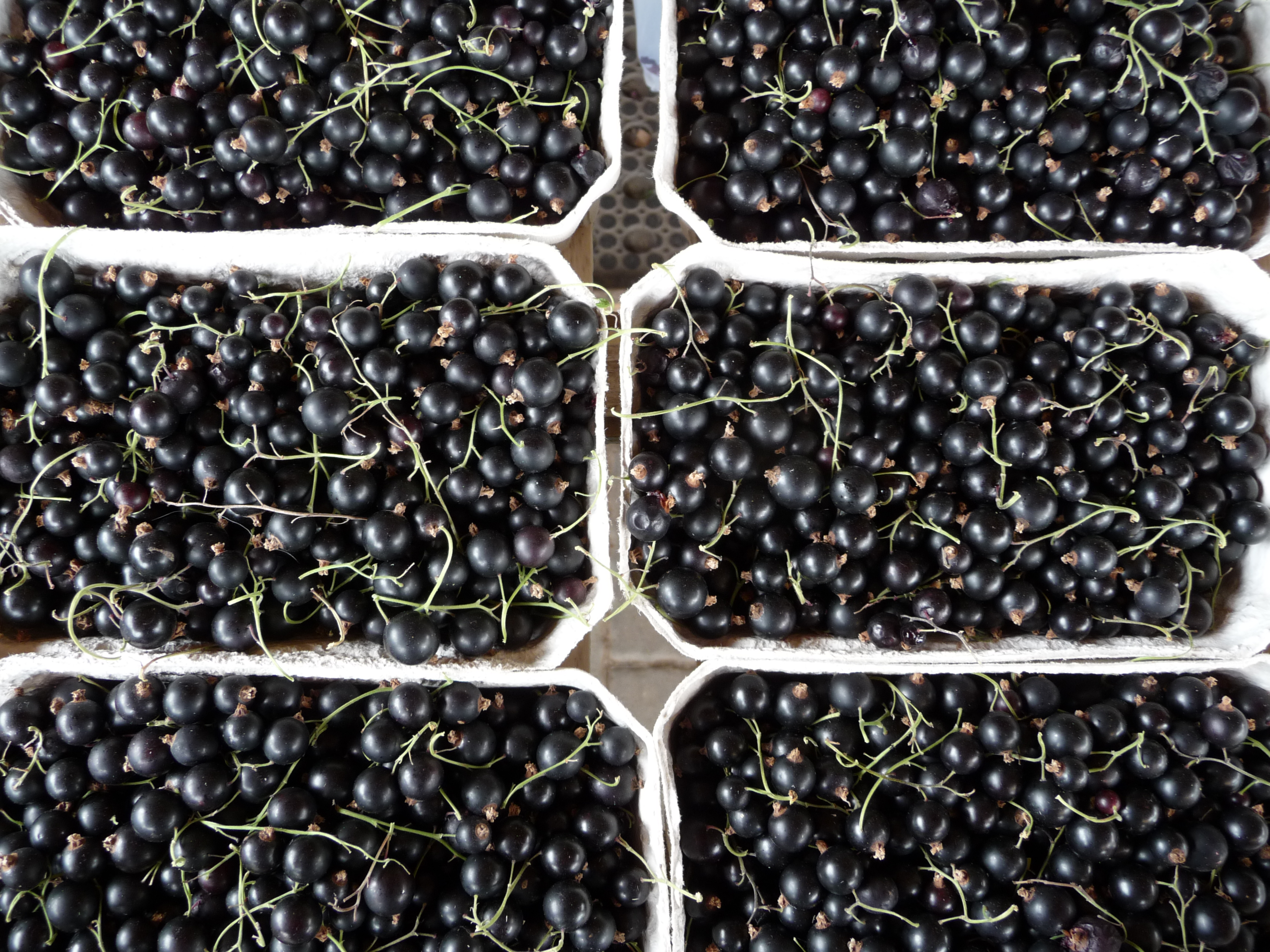 Schwarze Johannisbeeren im Verkaufsschälchen